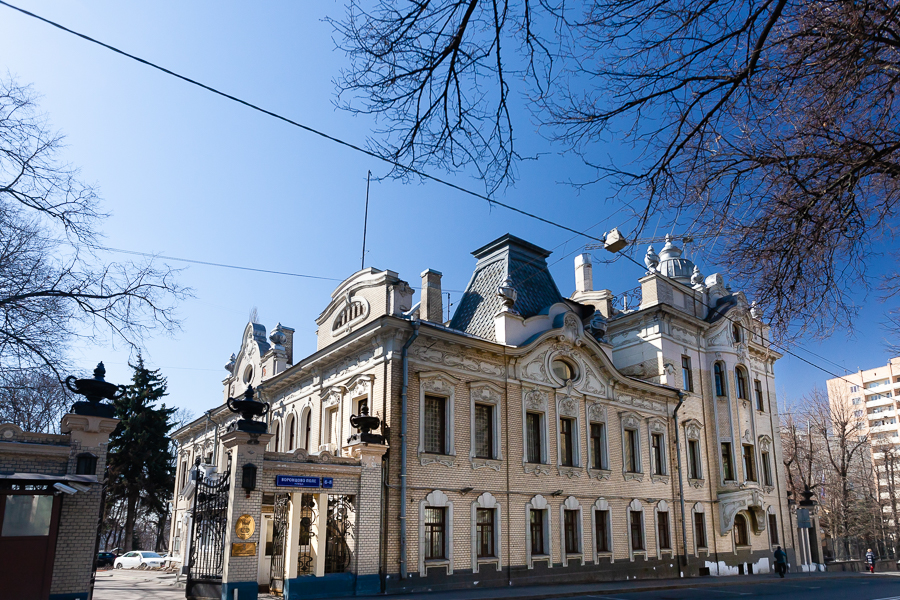 «Дом беседующих змей» работы скульптора Ивана Барютина, главный особняк усадьбы Латышевых — Бахрушиных — Бардыгиных в Москве по адресу Воронцово поле, 6-8. С 1952 года принадлежит посольству Индии.